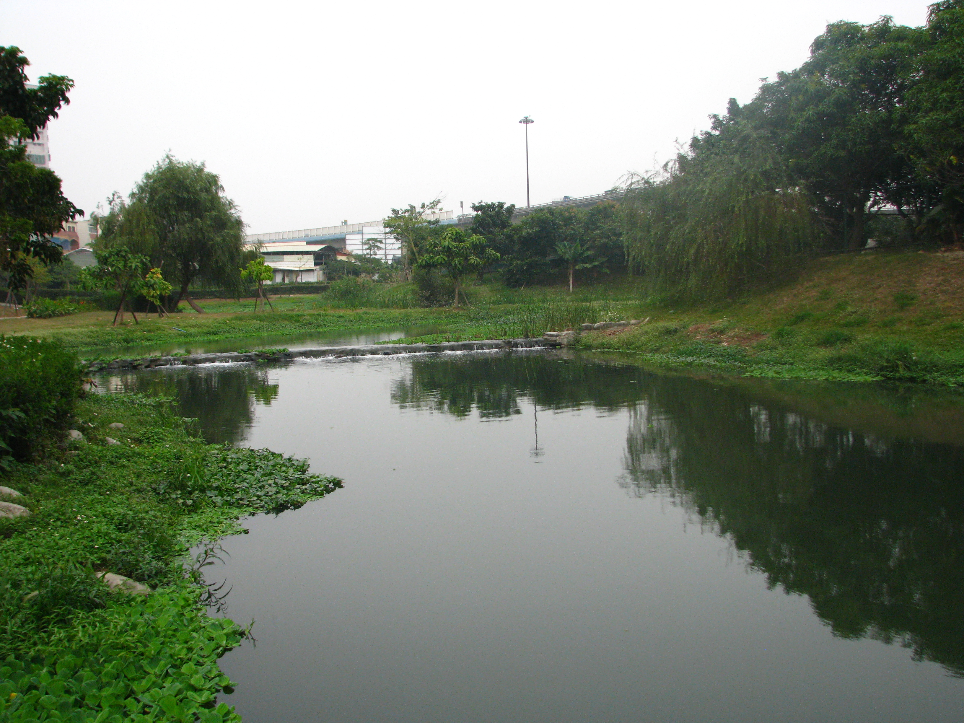 台灣高雄市愛河上游檨仔林埤